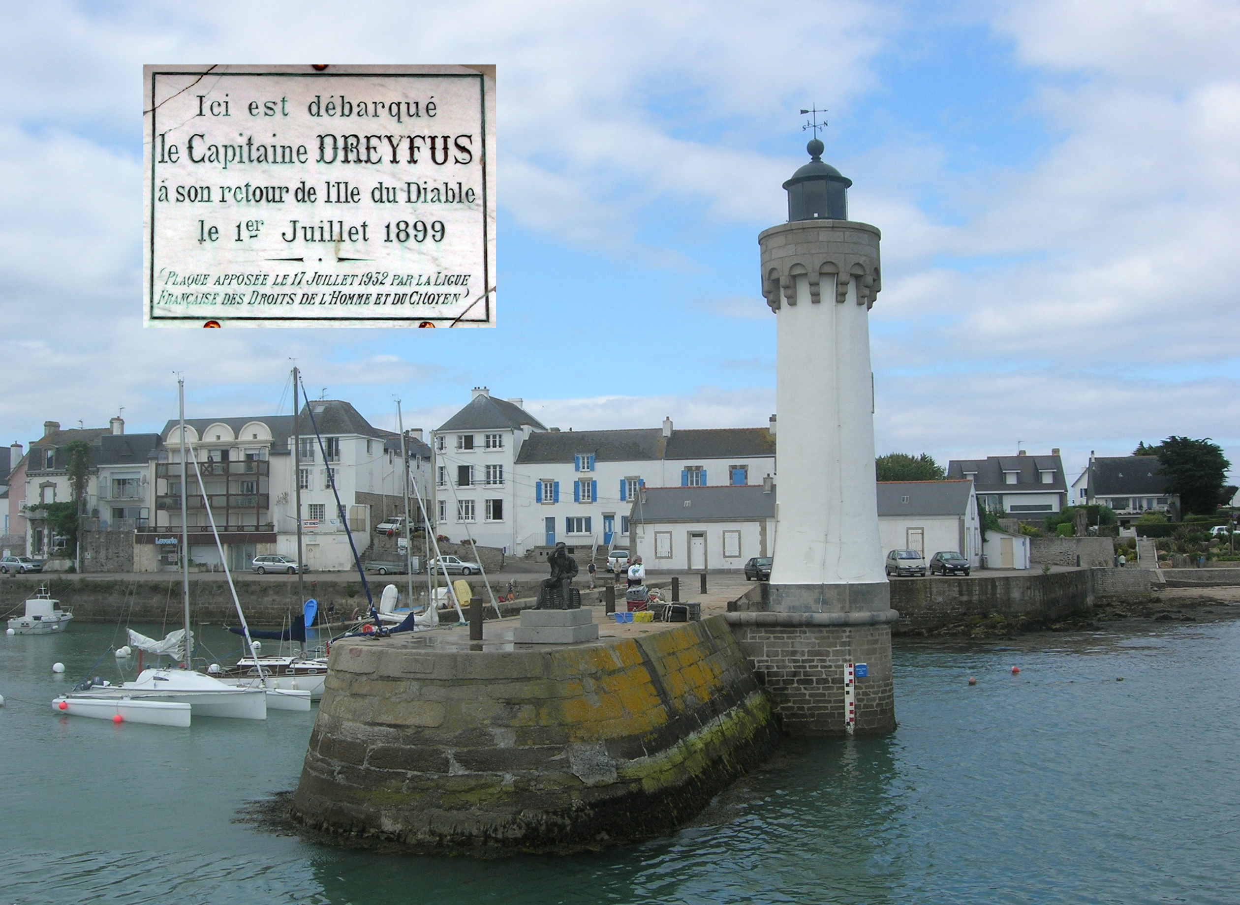 Port Haliguen, le port de plaisance de Quiberon